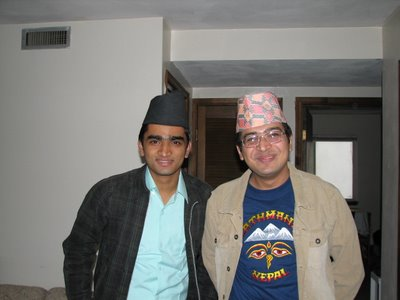 Ajaya and Me Krishna with Bhaad-gaaule topi and Me in Dhaakaa topi